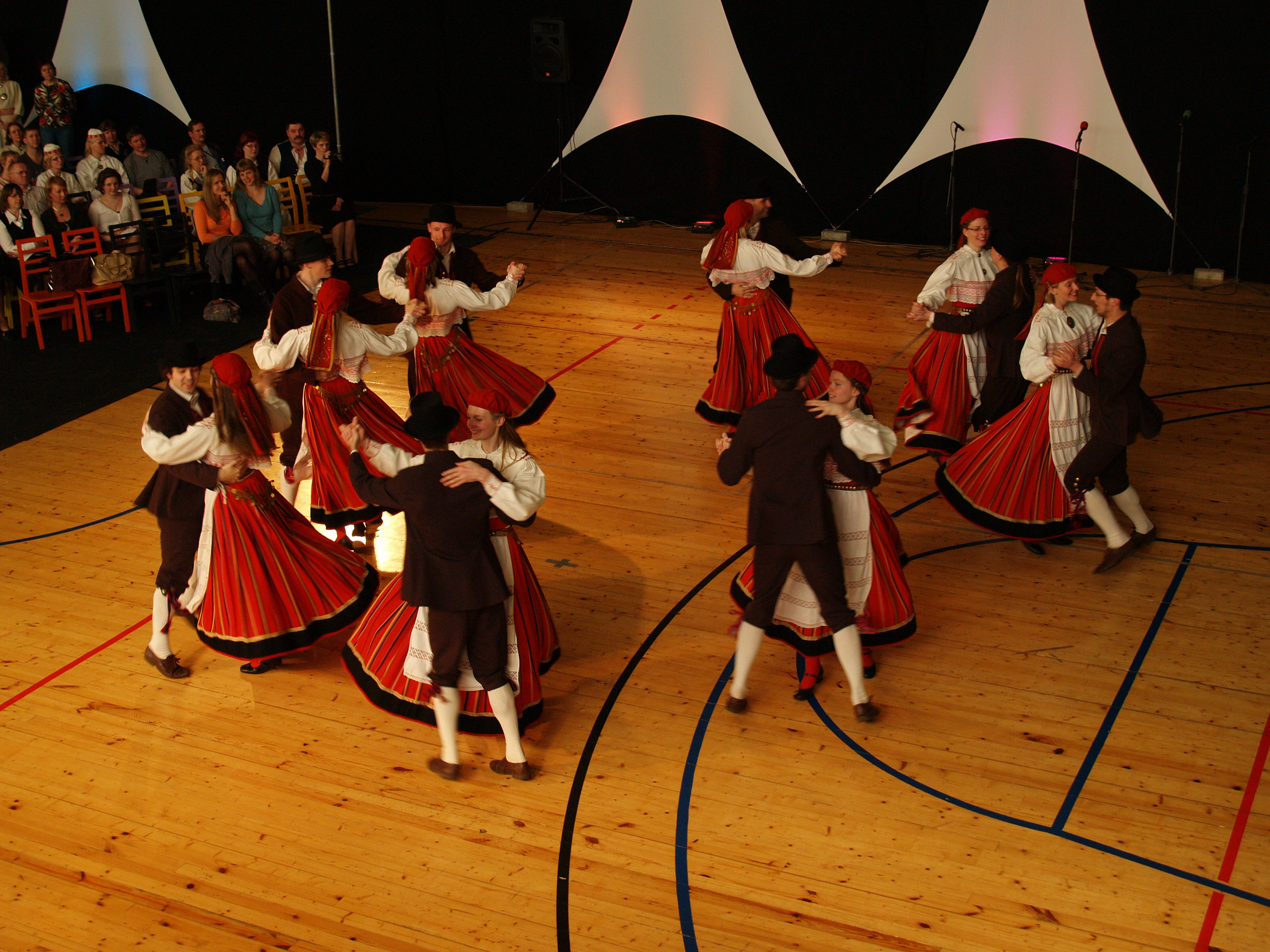 Tartu Ülikooli Rahvakunstiansambel Maie Orava võistutantsimisel Kose Gümnaasiumi võimlas.